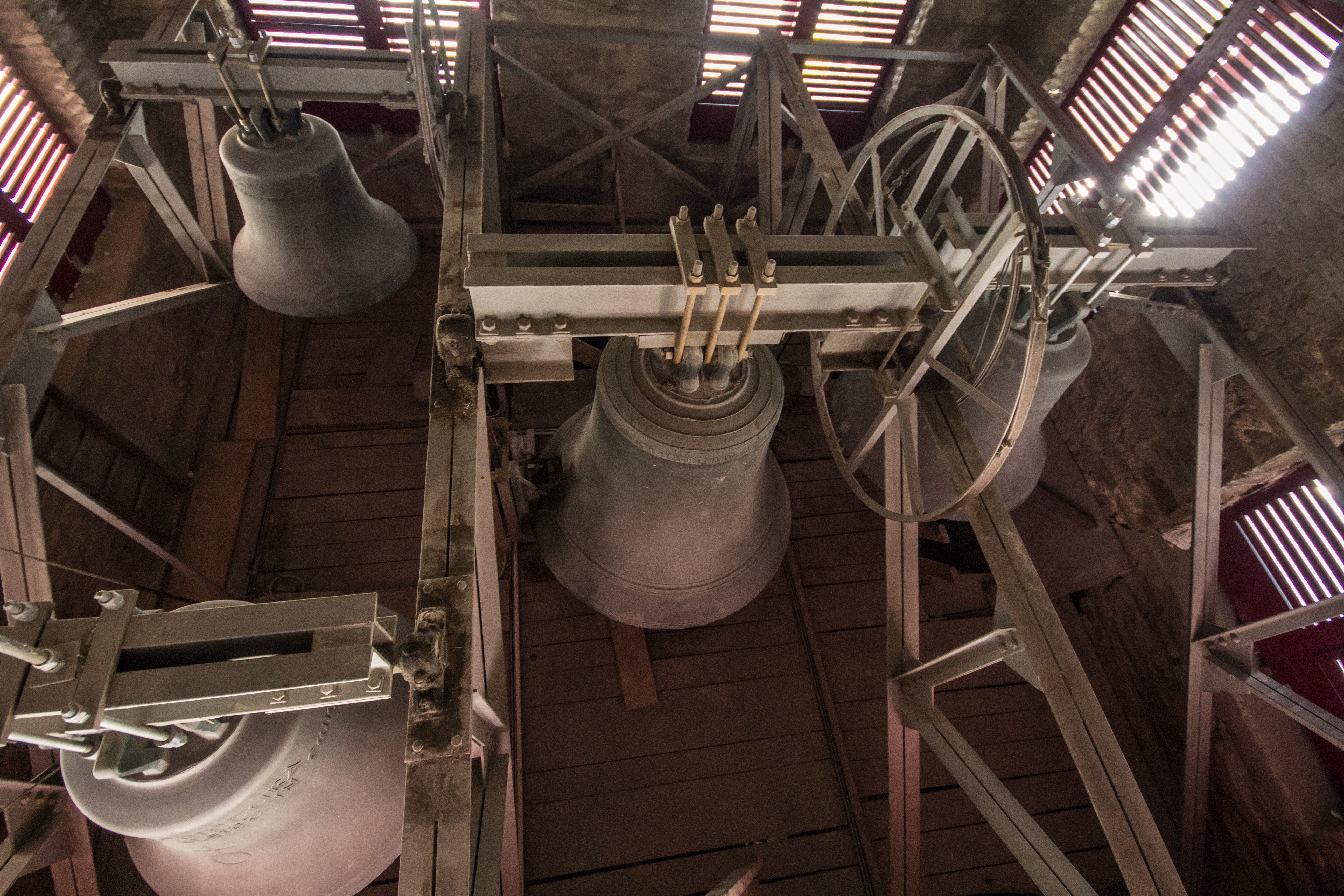 Die Glocken der ev. Kirche in Wiehl